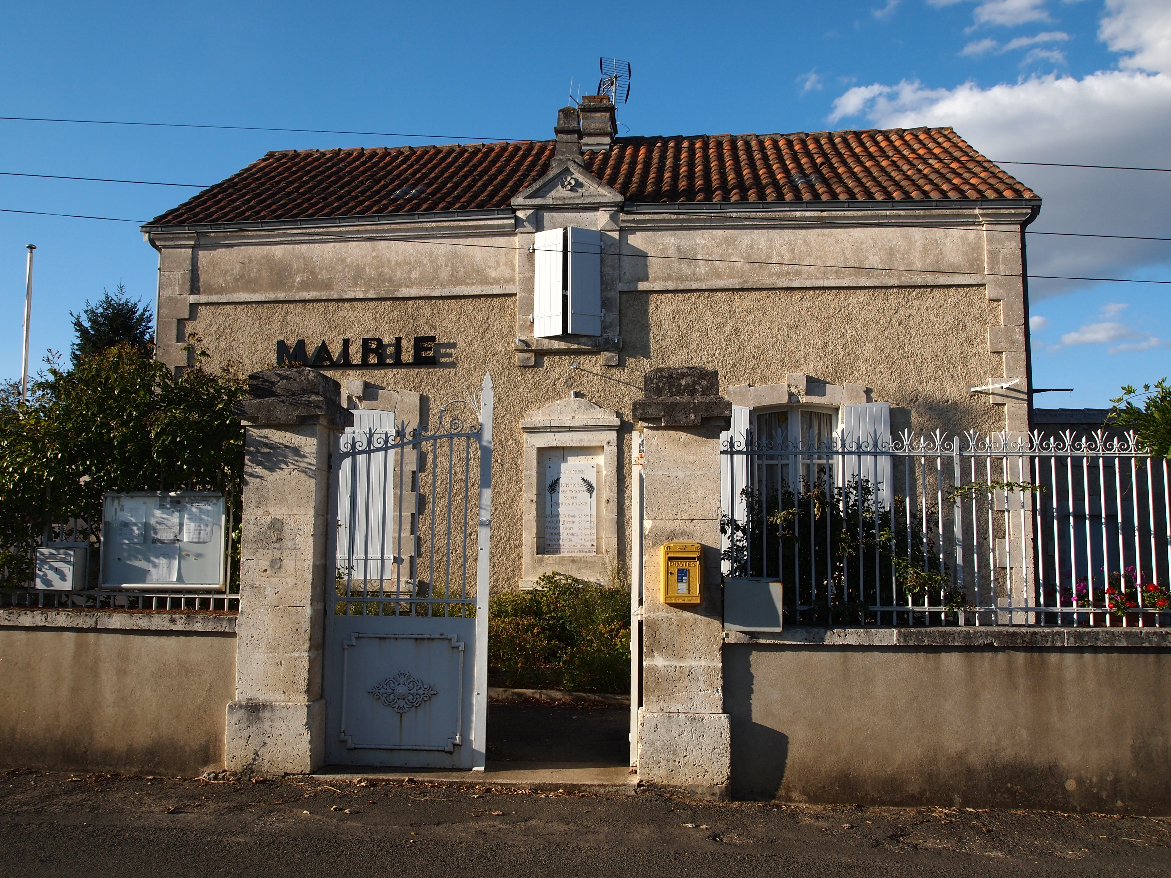 mairie de Lichères en Charente (France)